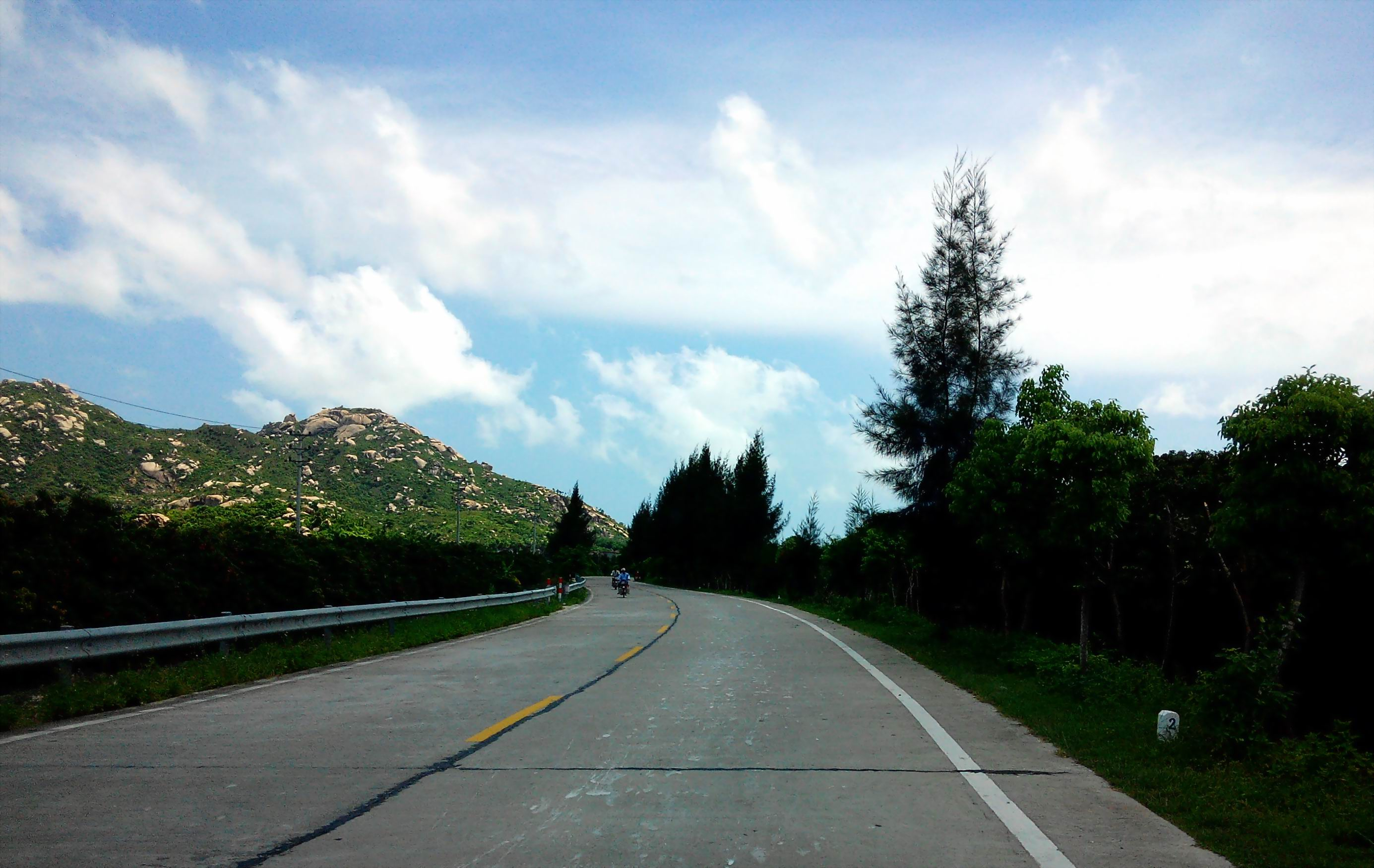 广东省道S365 台山段